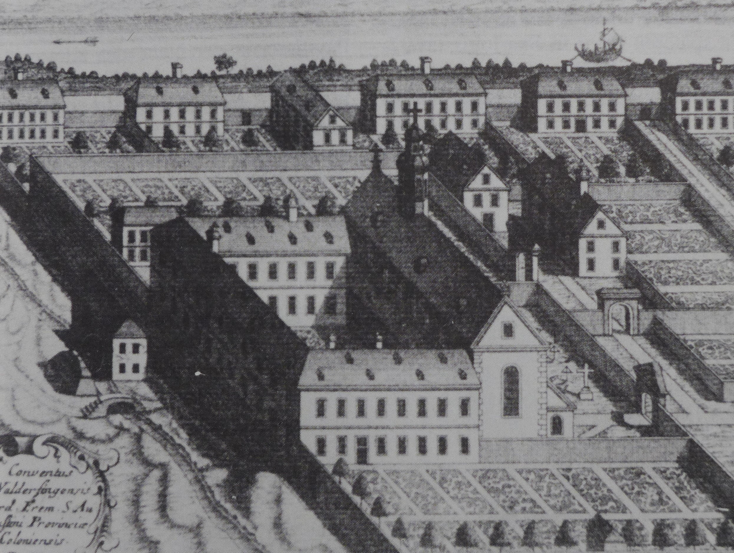 Augustinerkloster Wallerfangen, Stich um 1655